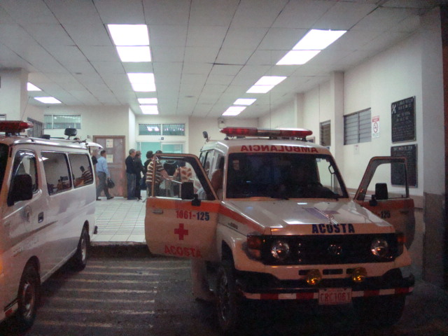 Entrada al servicio de emergencias del Hospital San Juan de Dios, San José de Costa Rica.